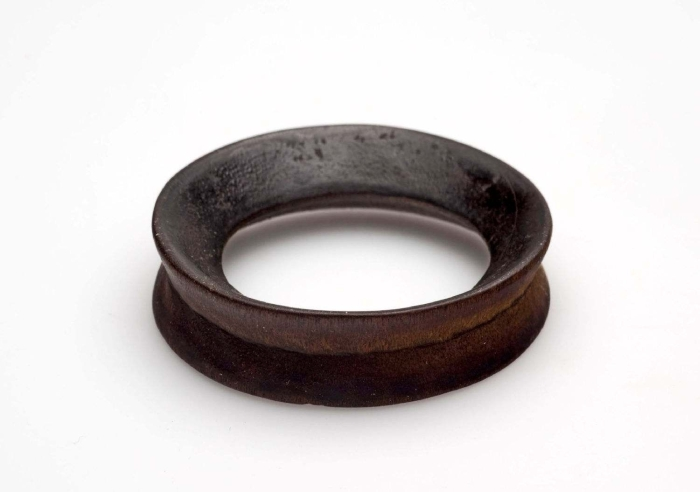 De oorring wordt door vrouwen in het verwijde onderste deel van het oor gedragen.